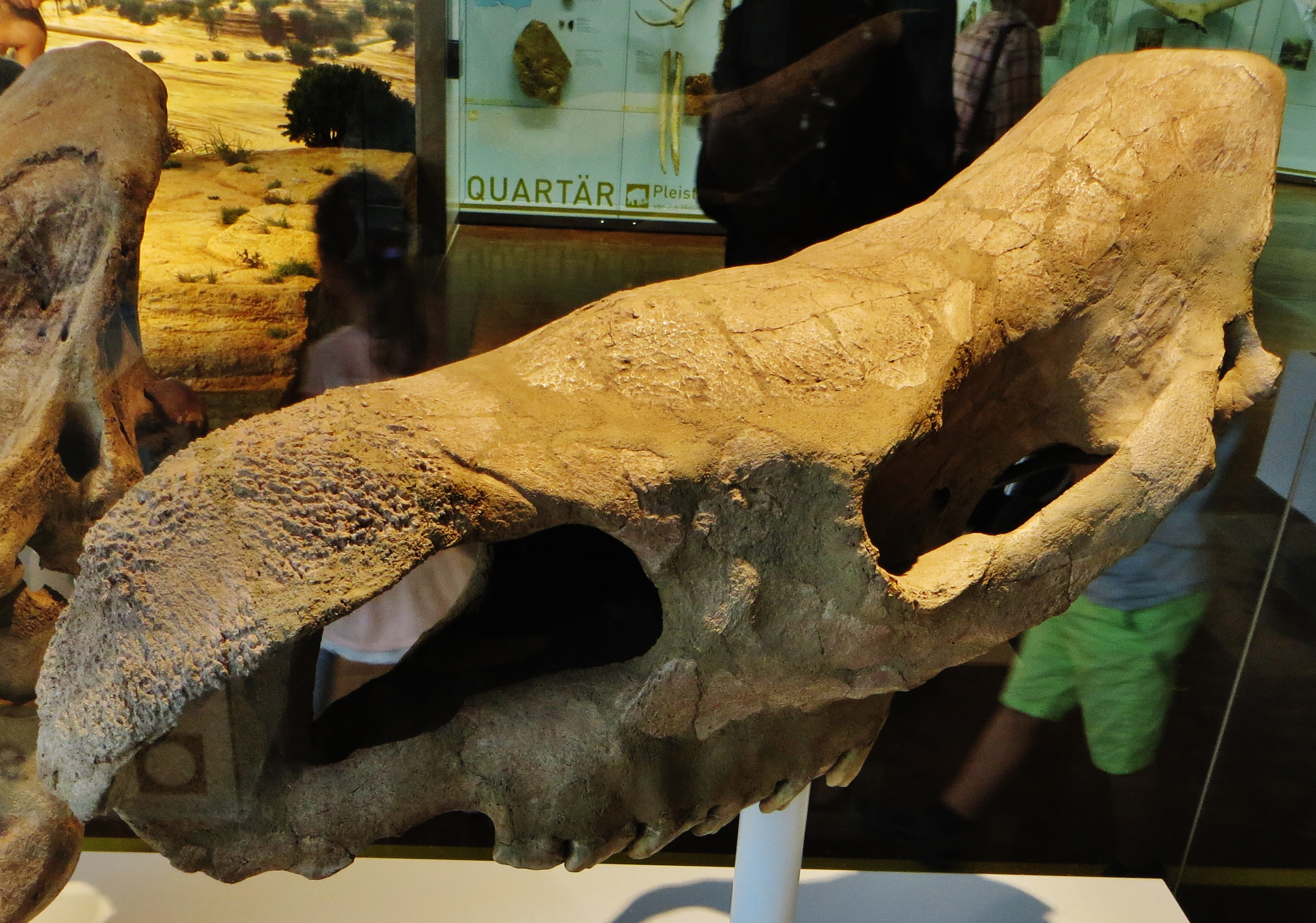 Fossil of Stephanorhinus- Took the picture at Museum am Lowentor, Stuttgart